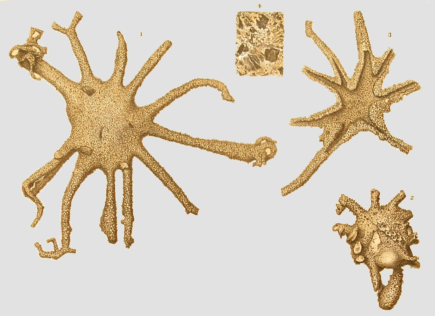 PLATE XIX. ASTRORHIZA. Figures 1-4. - Astrorhiza limicola, Sandahl Figs. 1, 2. Lateral aspect, Diam. x 8 Fig. 3. Specimen laid open to show the interior, Diam. x 8 Fig. 4. Portion of the test more highly magnified, to show the structure, x 100